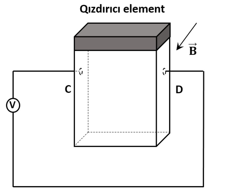 Nerst - Ettingshauzenın effektin yaranması